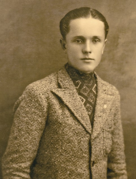 Василь Білас: Василь Білас